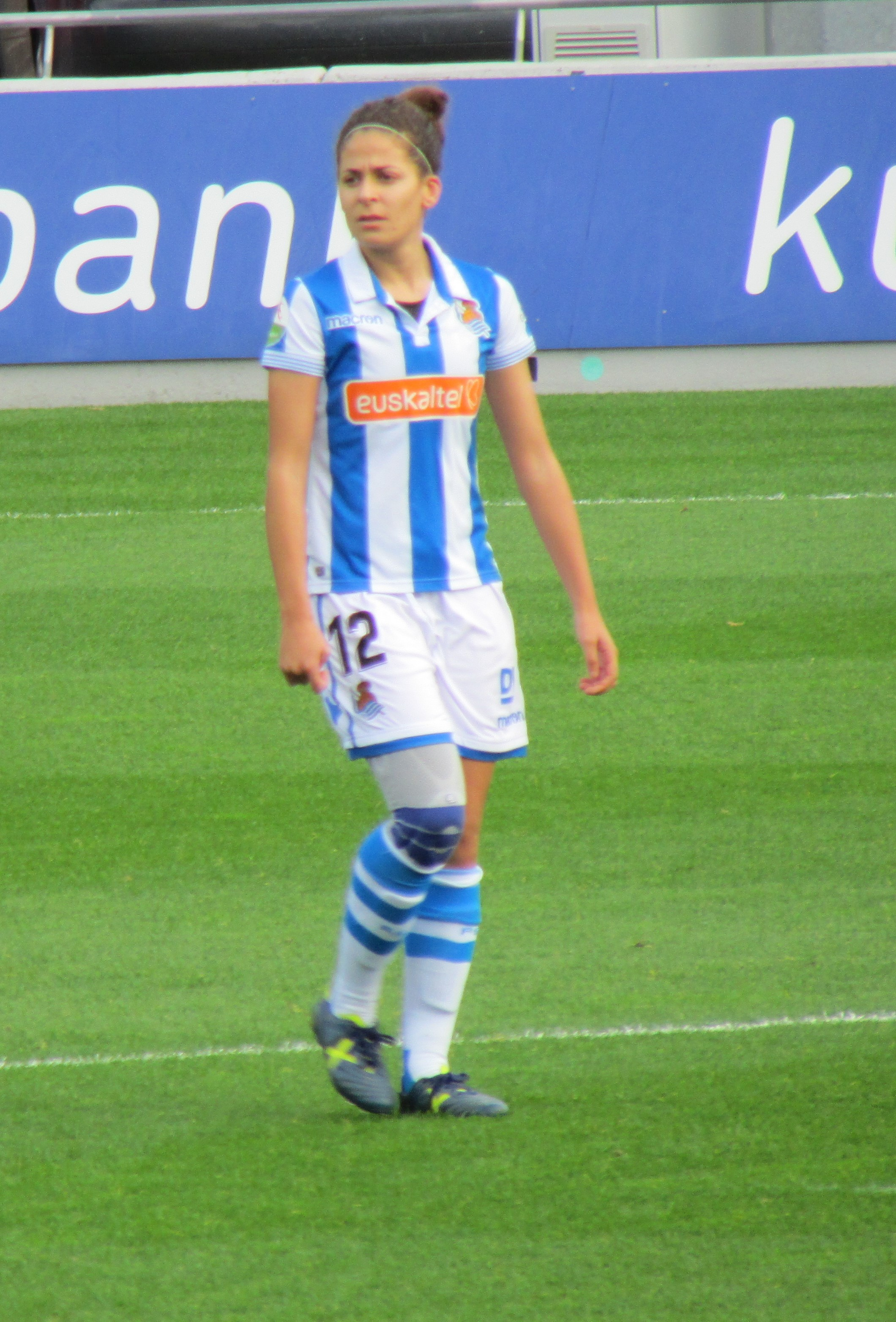 Futbolista de la Real Sociedad